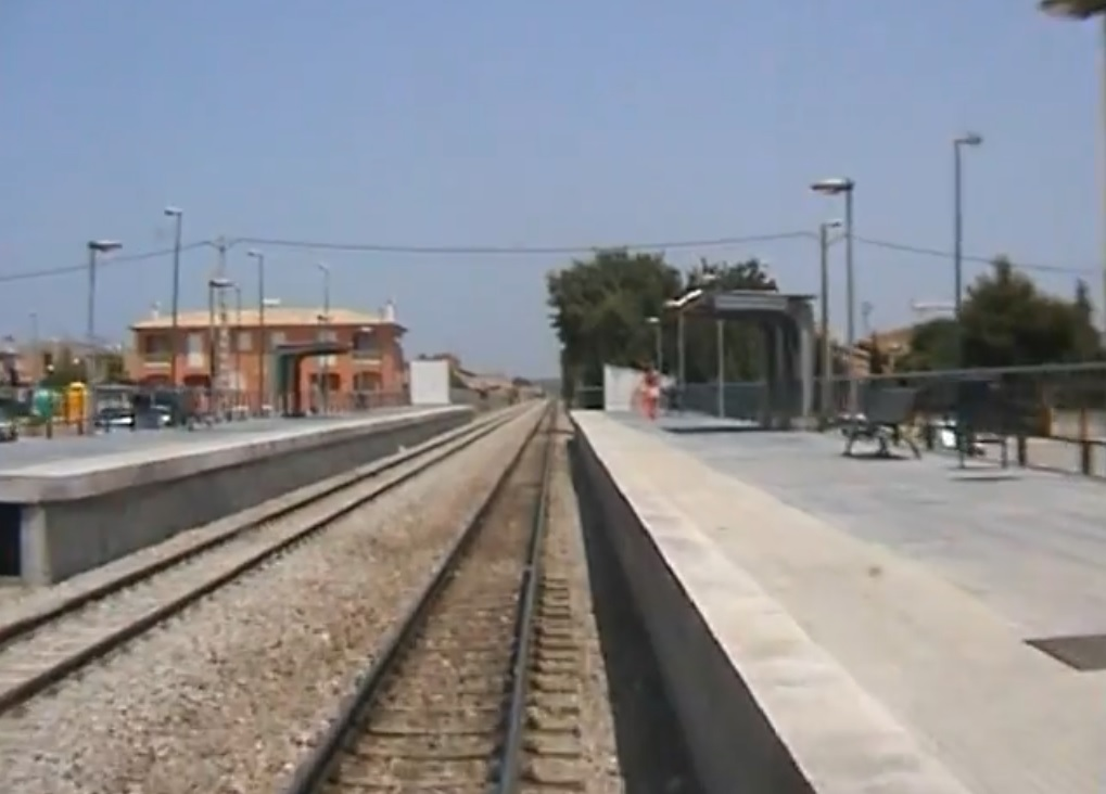 Estación de Pont d'Inca Nou